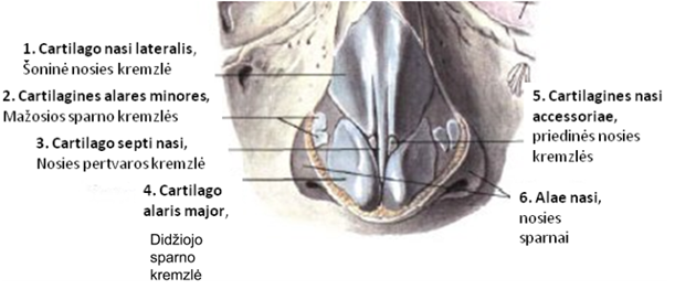 Nosies kremzlės